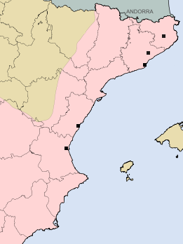 Localización de los equipos participantes en la Liga del Mediterráneo